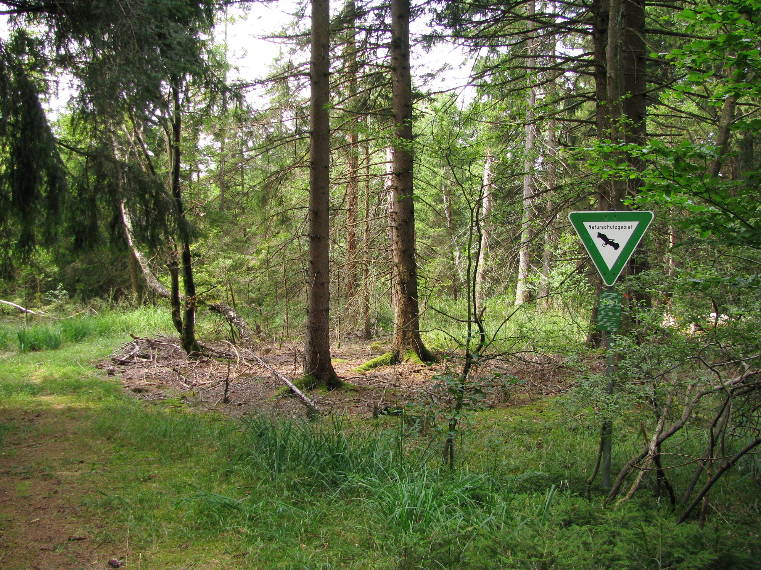 NSG Wildmoos